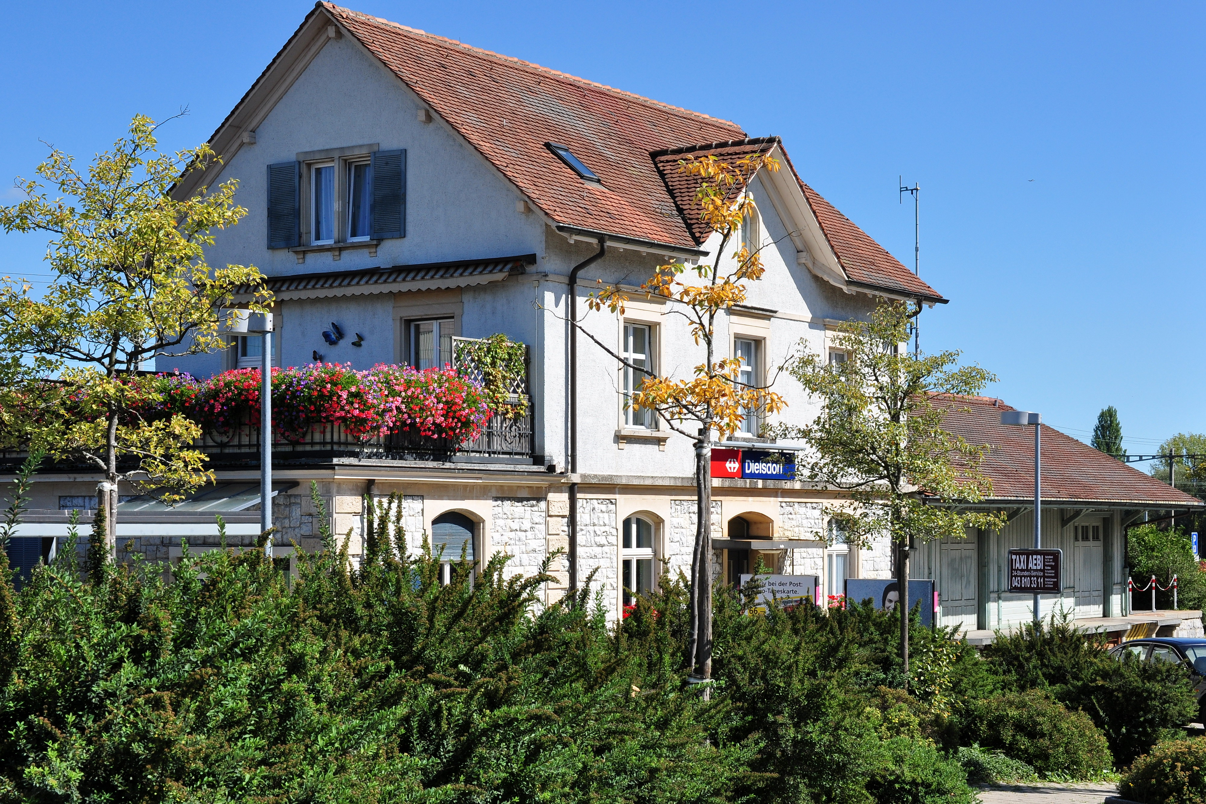 Bahnhofgarten in Dielsdorf (Switzerland)